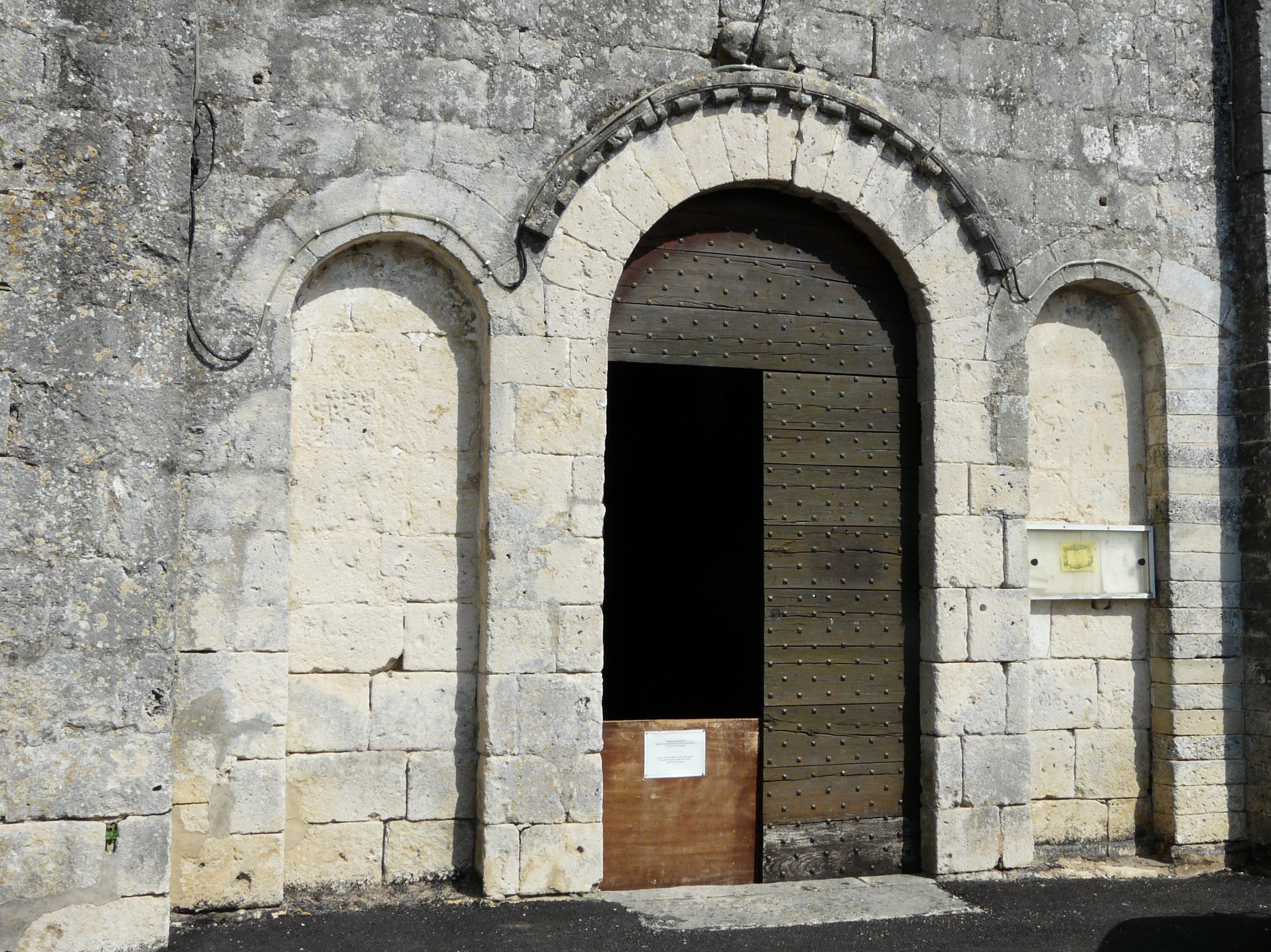 Le portail occidental de l'église Saint-Christophe de Vindelle, Charente, France.